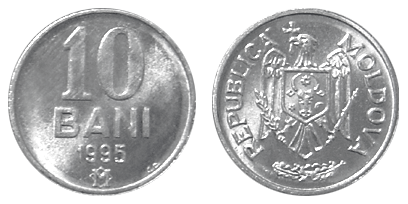 10 Bani - Moldova